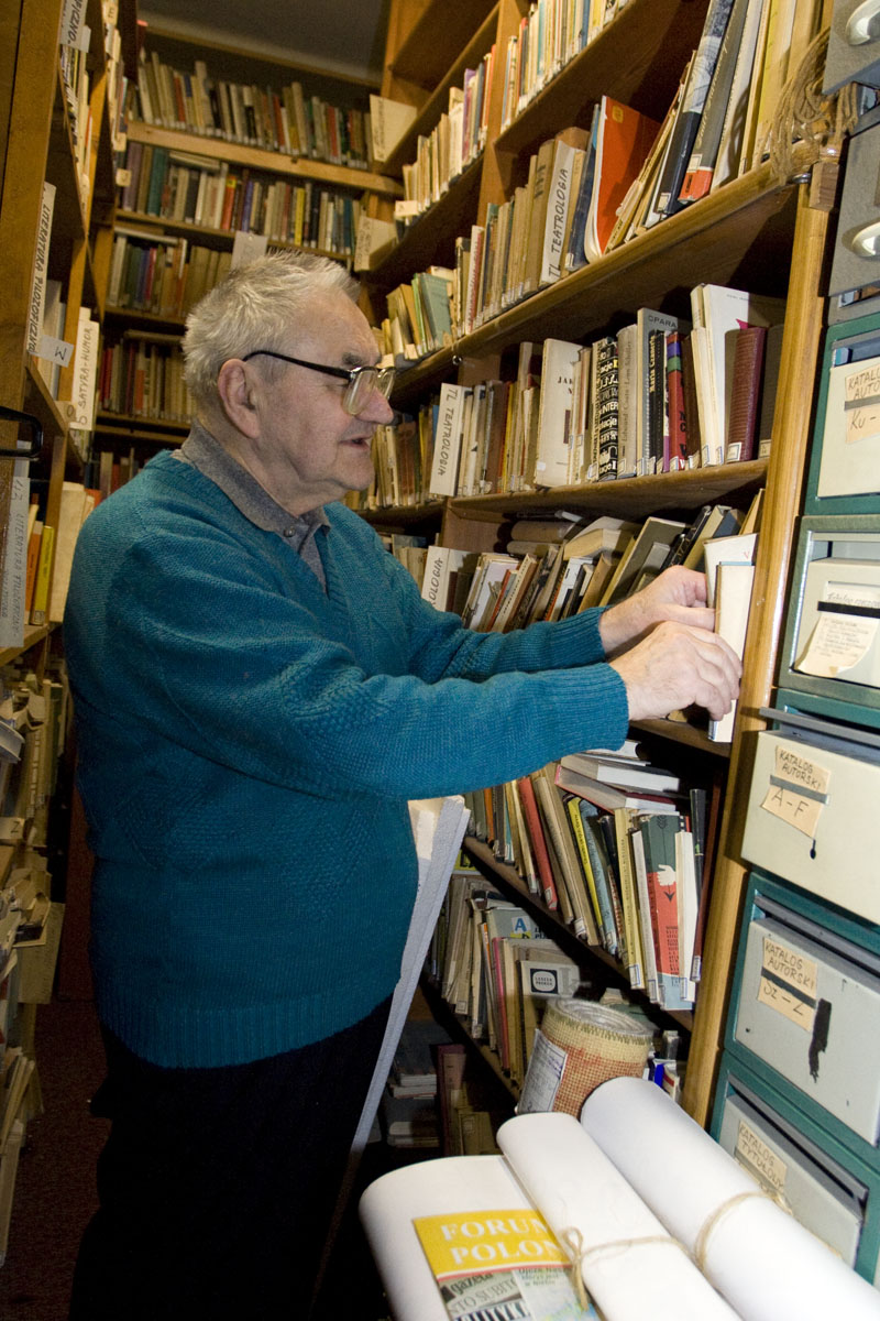 Stanisław Zahradnik